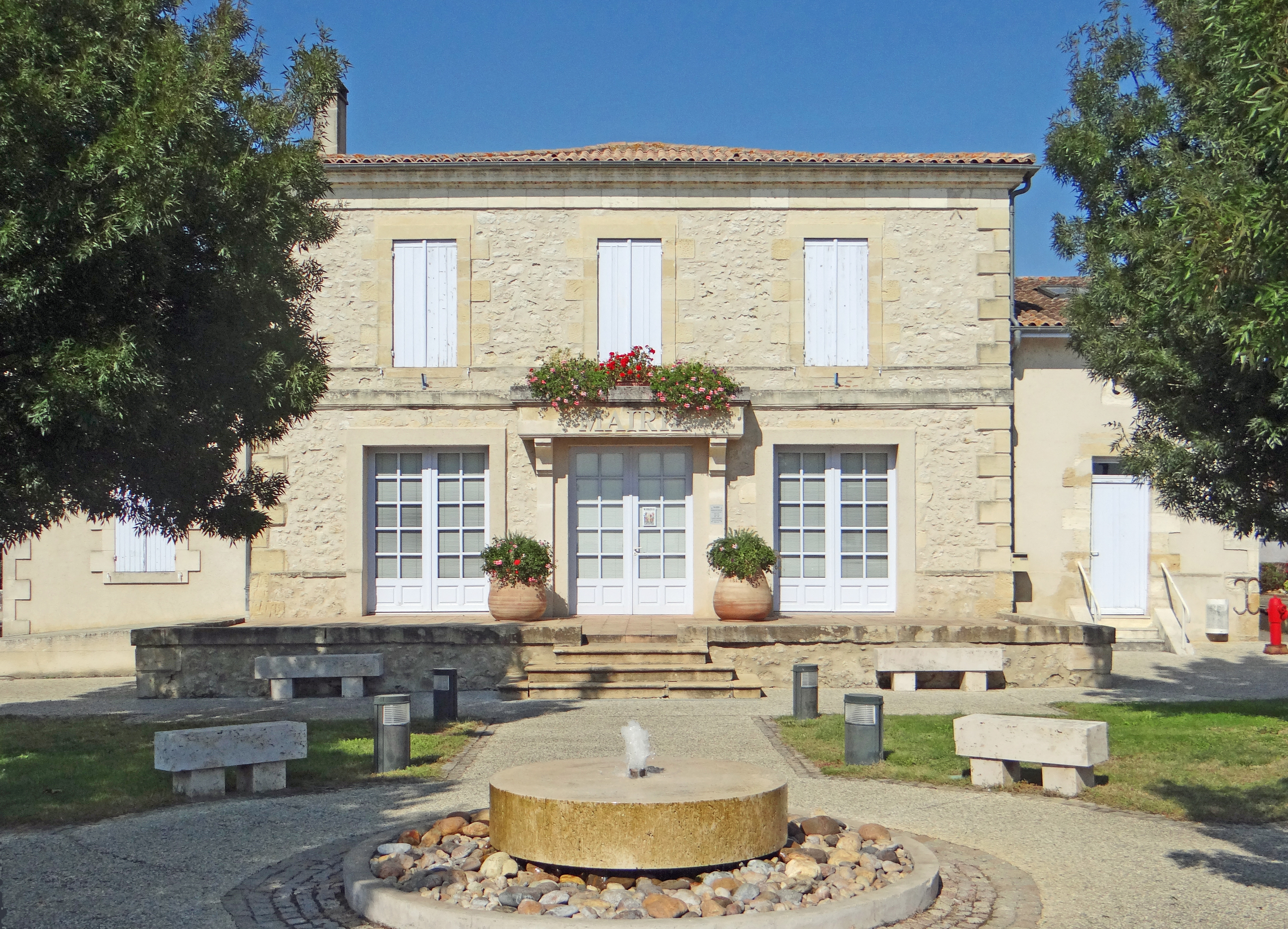 Virazeil - Mairie